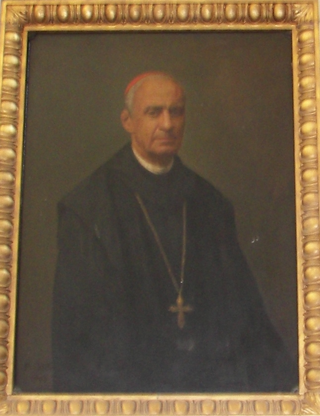 Cardinale della Chiesa Cattolica Giuseppe Benedetto Dusmet; ritratto del Cardinale nel monumento sepolcrale della Cattedrale di Catania.